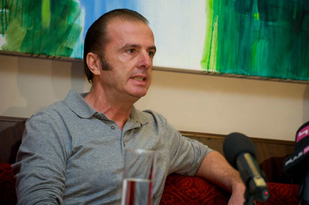 Werner Rydl in Wien 2010